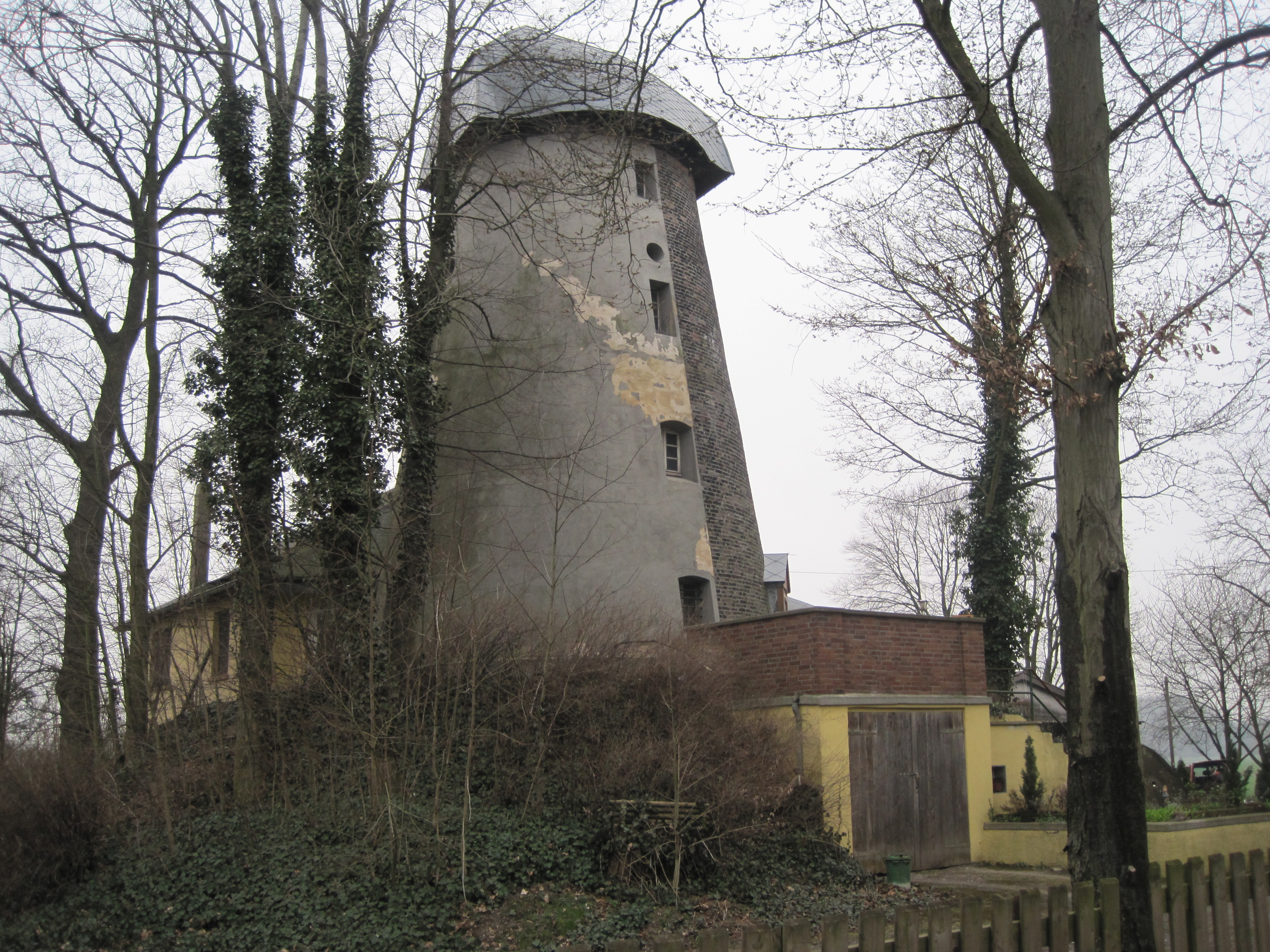 Das Foto zeigt die Klostermühle in Hamm-Bockum-Hövel.